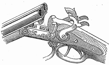 Lefaucheux-Gewehr mit Bügelverschluss (Einzel- und Hinterlader) aus Meyers Konversationslexikon 1888